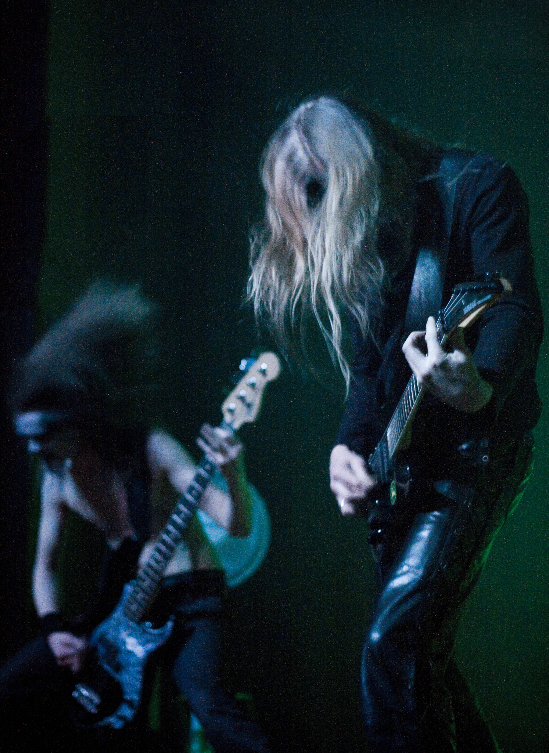 Photo du bassiste et du guitariste d'Antestor prise au Elemants of Rock.